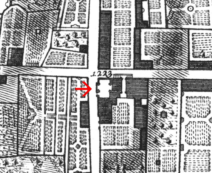 Pianta di Nolli